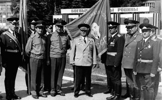 Дважды Герой Советского Союза генерал армии Лелюшенко Д.Д. у Боевого Знамени 68-го гв. тп. Бернау, ГДР, ГСВГ 1983.